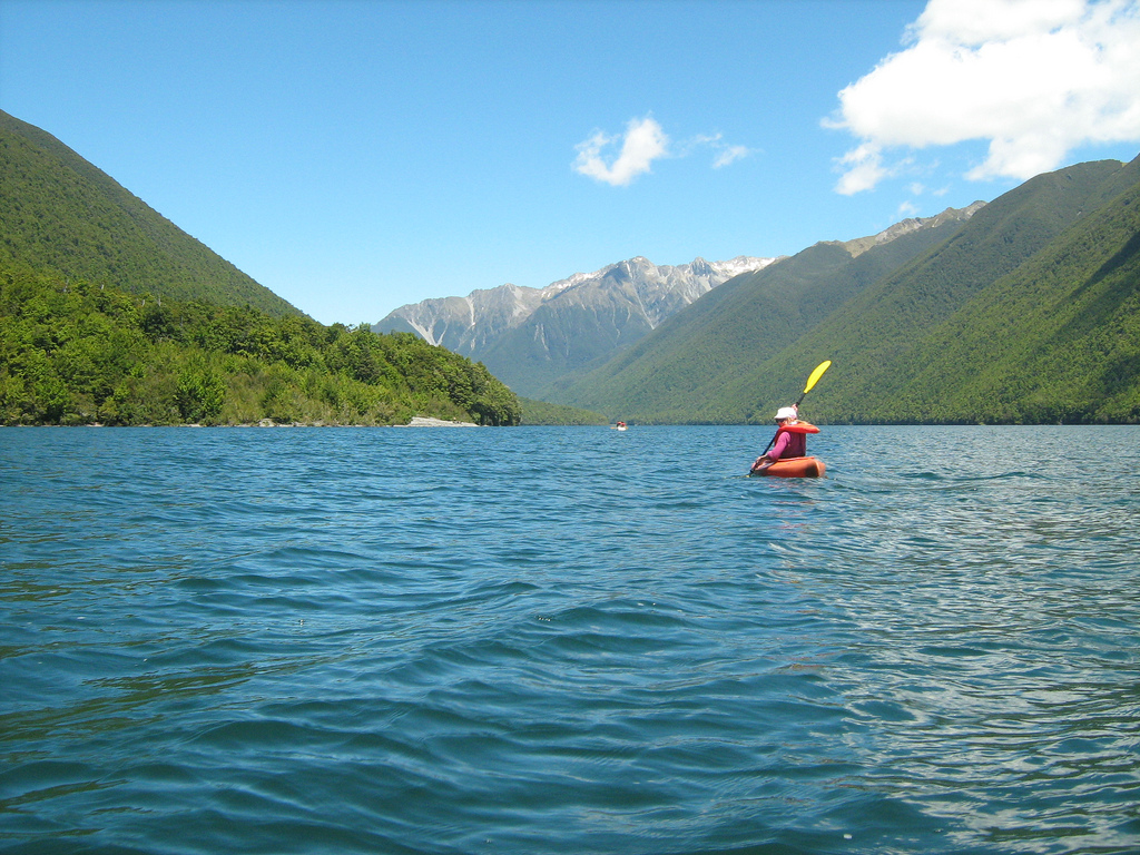 Lake Rotoiti 122009 100